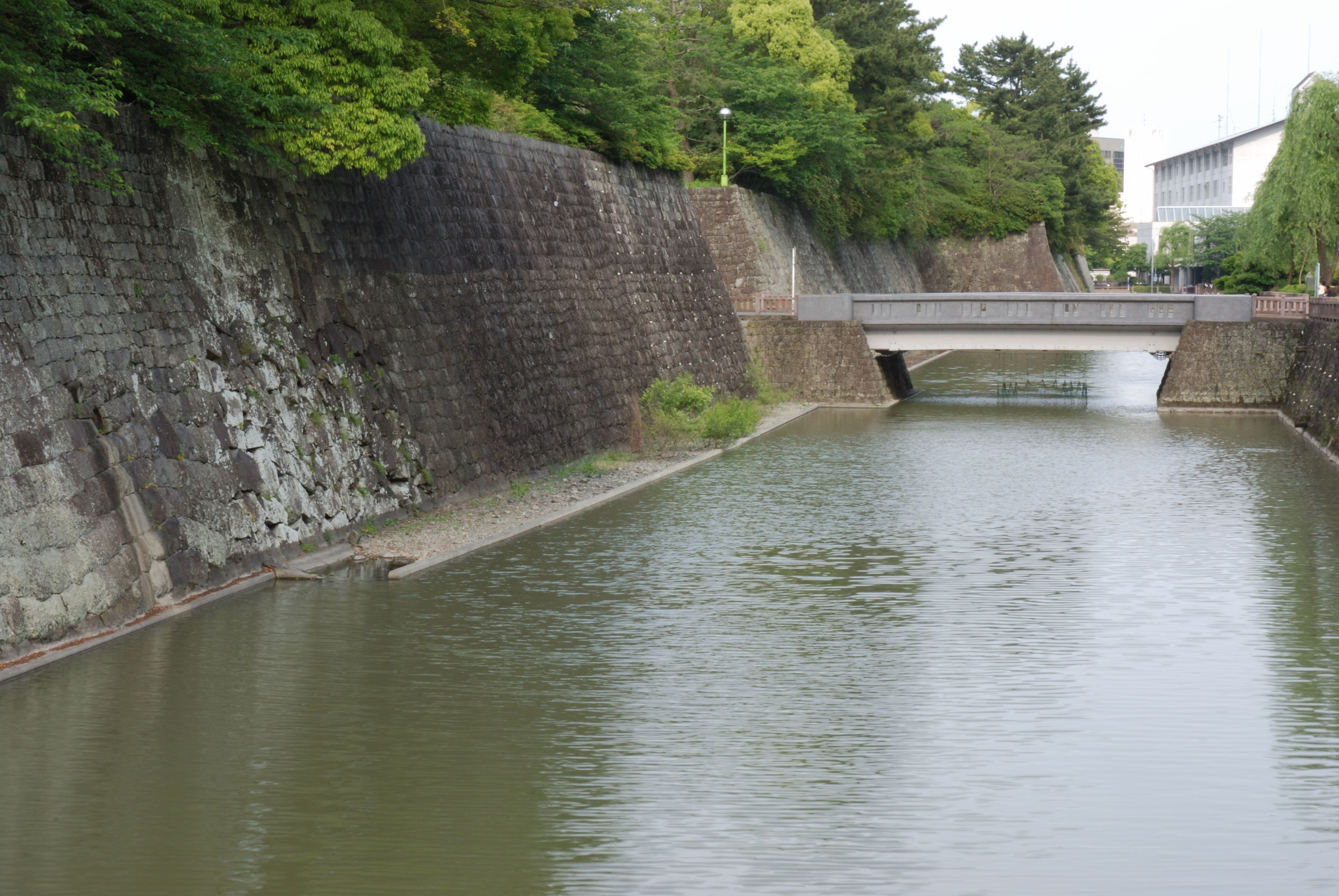 Nakabori